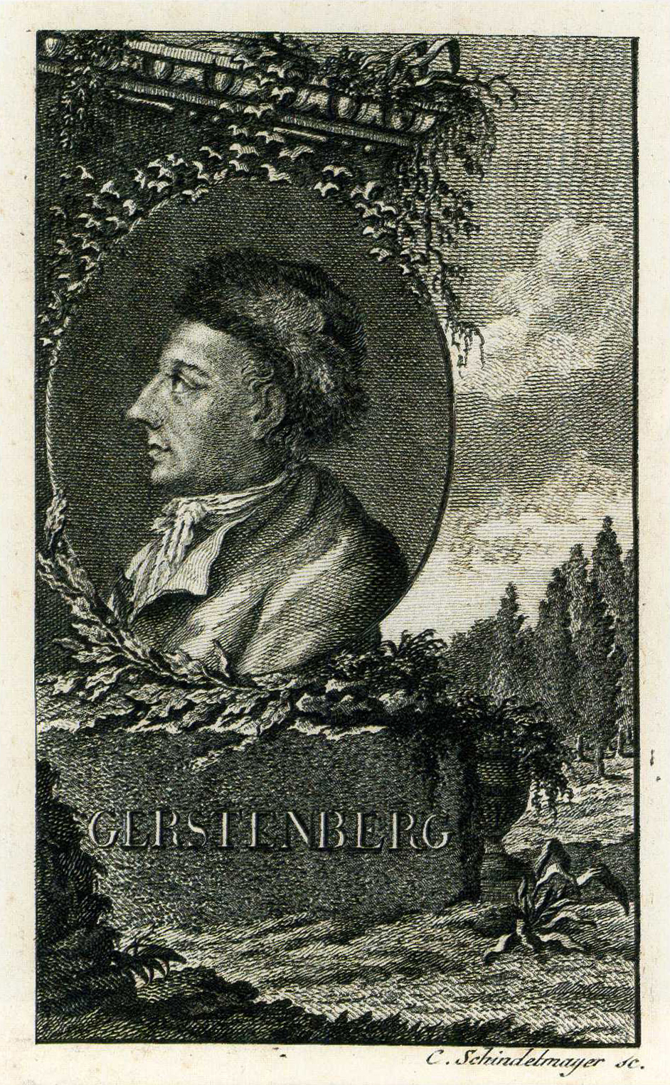 Karl Robert Schindelmayer: Heinrich Wilhelm von Gerstenberg, um 1795. Radierung, 12,9 x 8 cm. Gleimhaus.